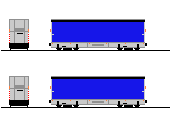 Ansichtszeichnung eines Mittelwagens der Güterstraßenbahn in Dresden.